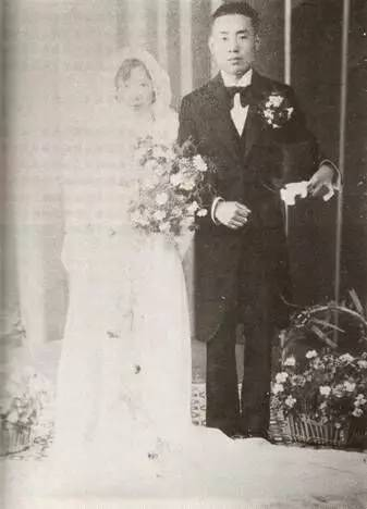 劉粹剛と許希麟の婚約写真